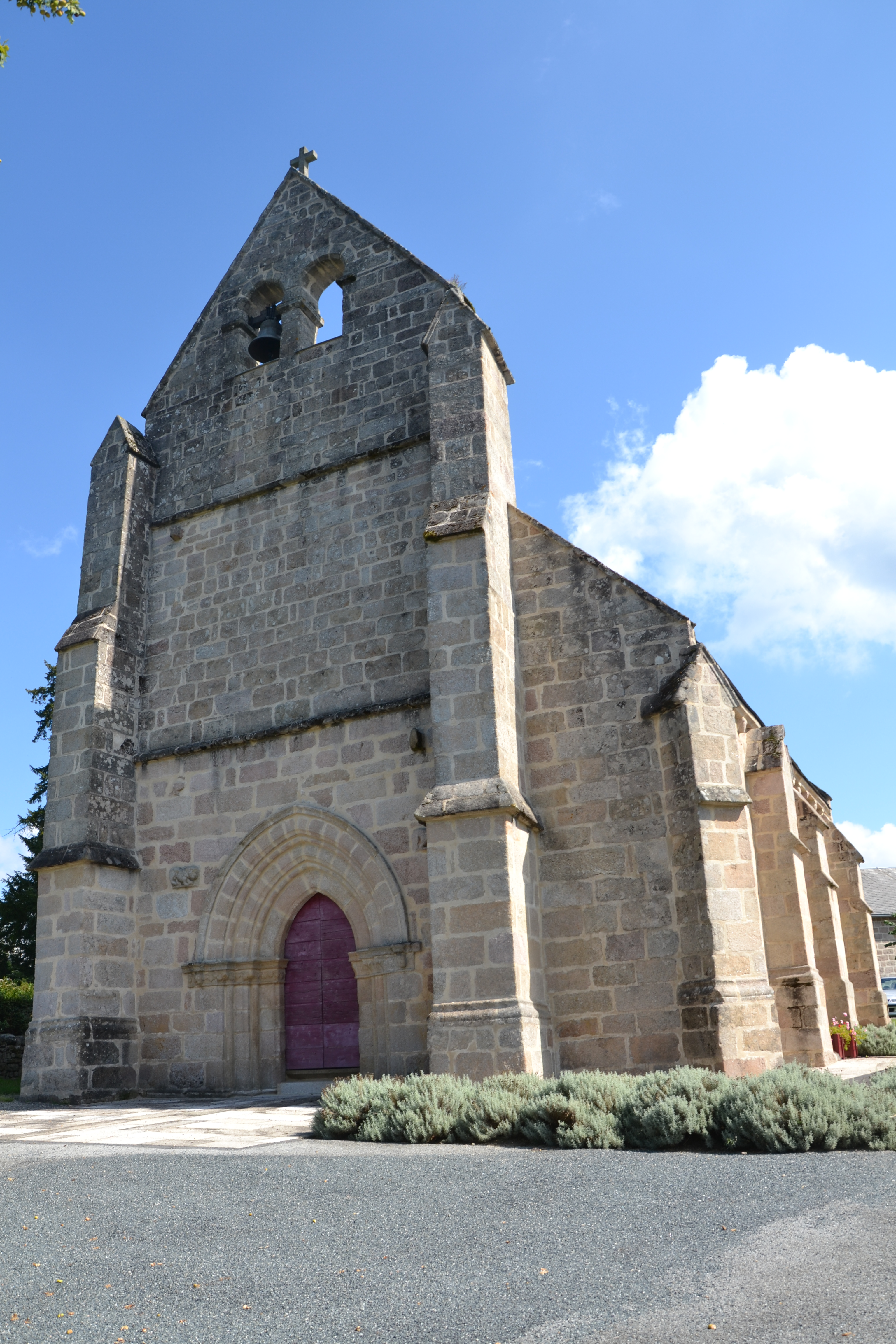 Eglise de Rempnat (Haute-Vienne, France)